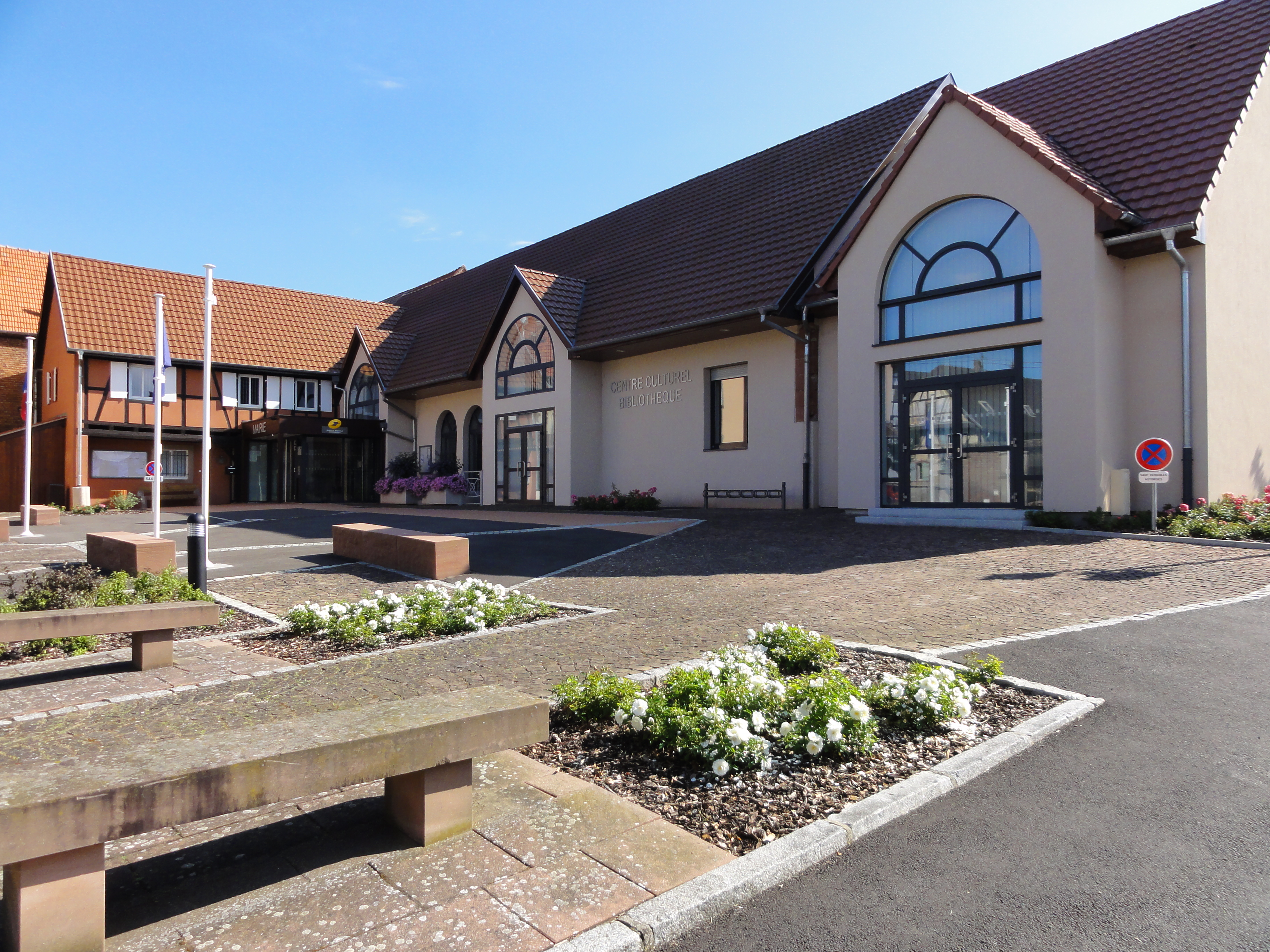 Alsace, Bas-Rhin, Schwindratzheim, Nouvelle mairie, bibliothèque, centre culturel et agence postale, 23 rue de la Zorn.